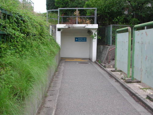 JR新潟大学前駅、南北連絡地下通路